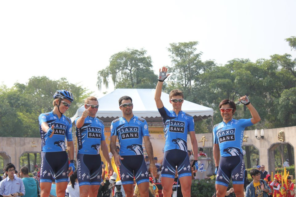 薩克松銀行2012環台賽高雄站